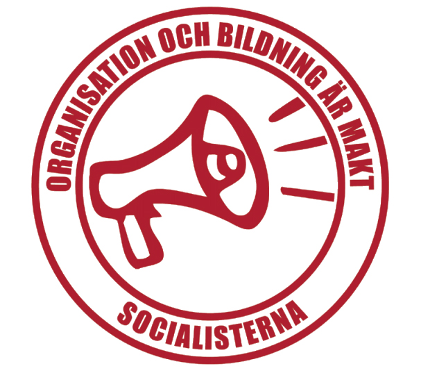 Logotyp för Socialisternas föreningstidning Struten. Återkommande i flygblad & affischer